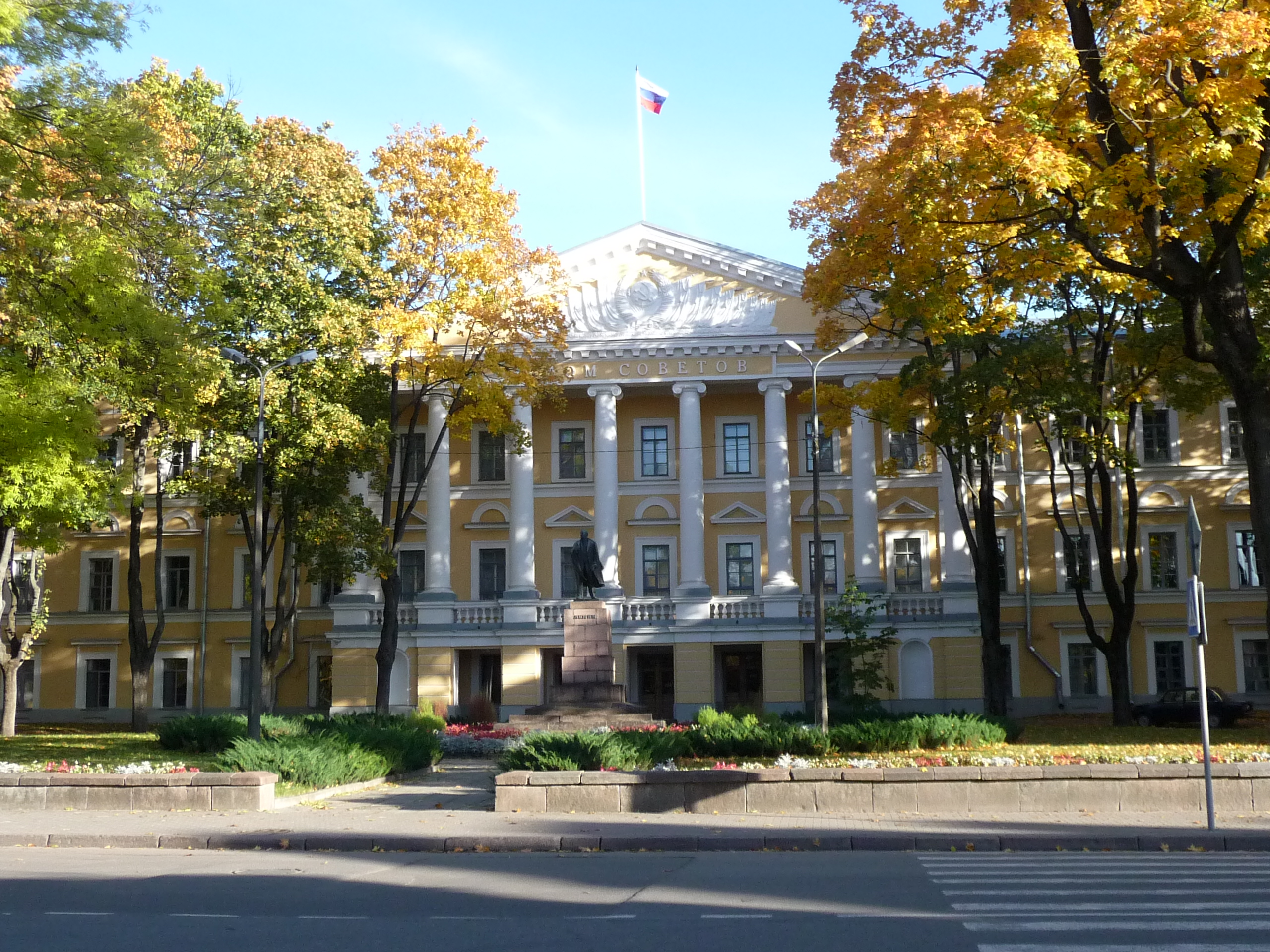 Администрация Псковской области